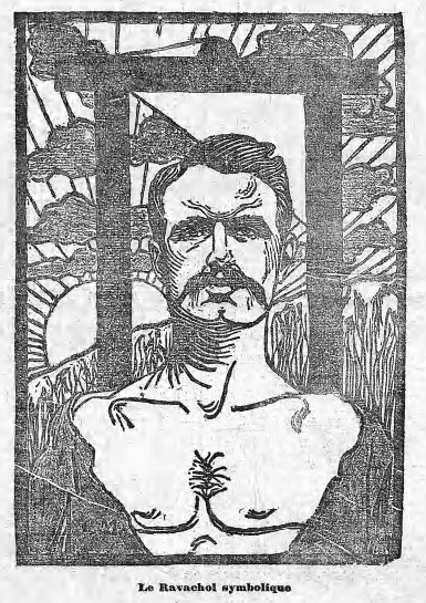 Le Ravachol symbolique